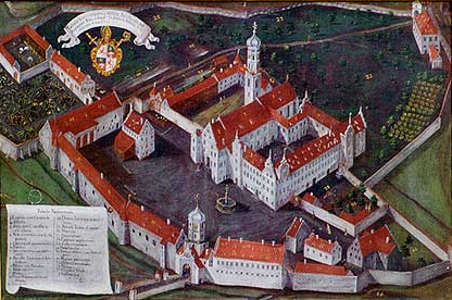 Kloster Schussenried, Ansicht von 1721 mit dem Wappen des Abts Didacus Ströbele